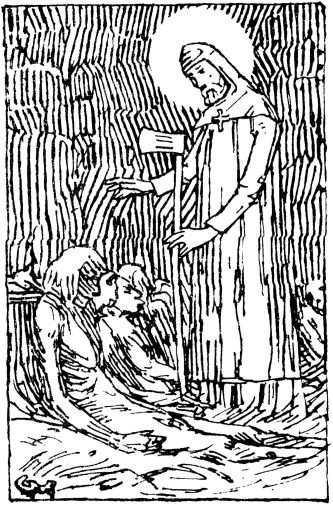 Gerhard Munthe: Illustration for Magnussønnens saga. Snorre 1899-edition. nn: «Natta etter syntest han i søvnen at han såg ein mann stå attmed seg.» nb: «Natta etter syntes han at han så i søvne en mann stå nær ved ham.»